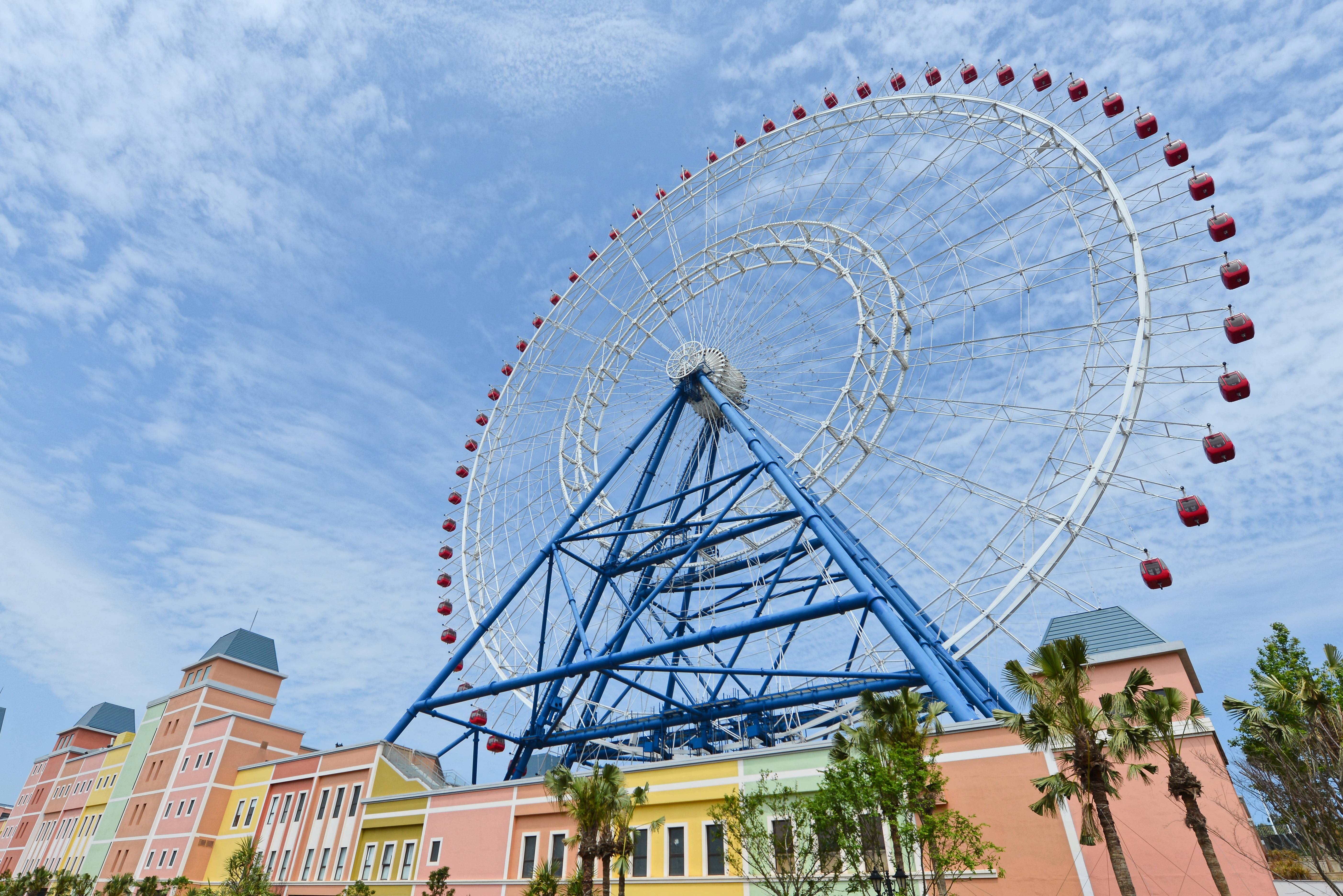 麗寶樂園天空之夢摩天輪。